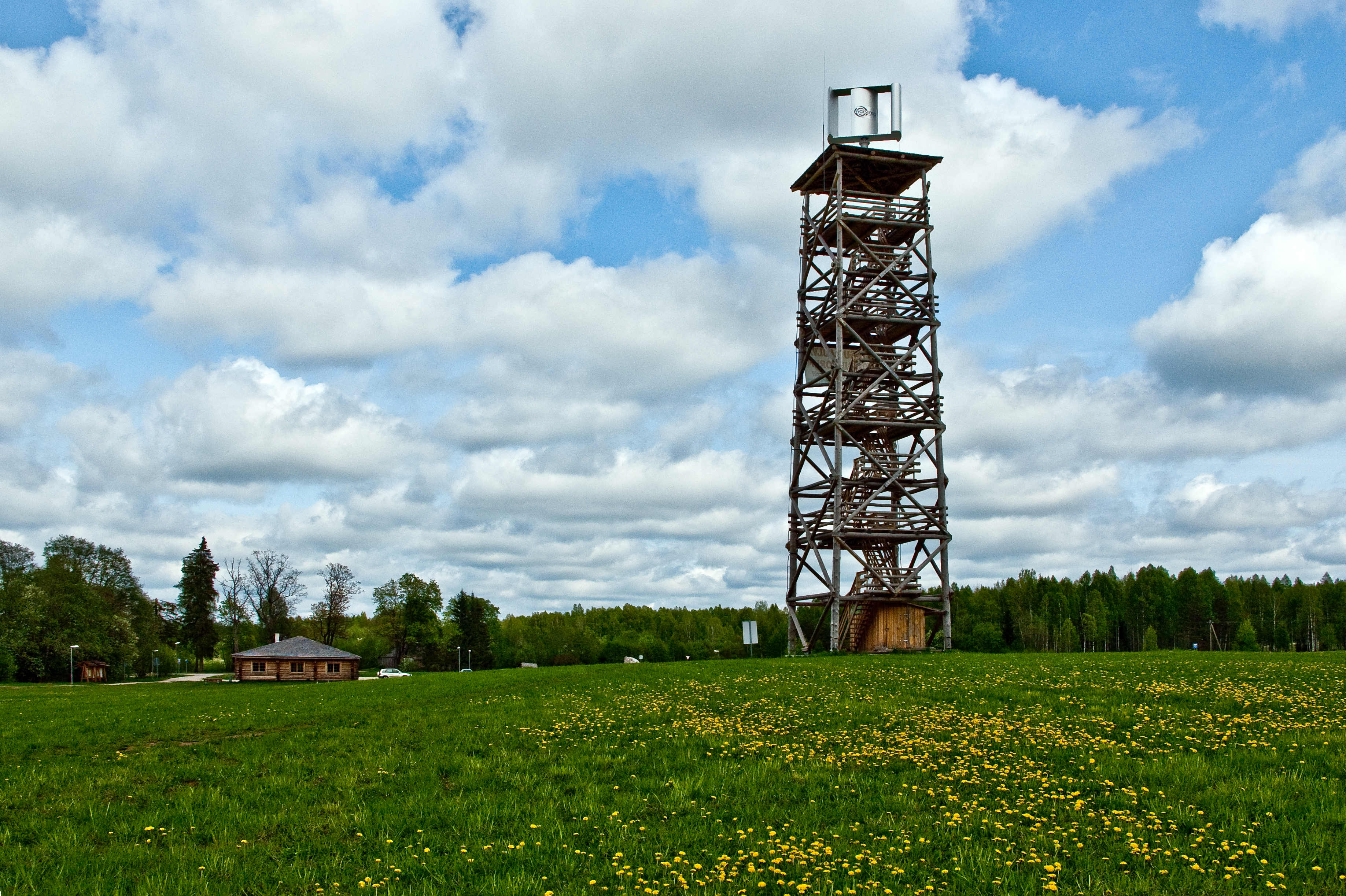 Rõuge Ööbikuoru keskus ja tuulegeneraatoriga vaatetorn